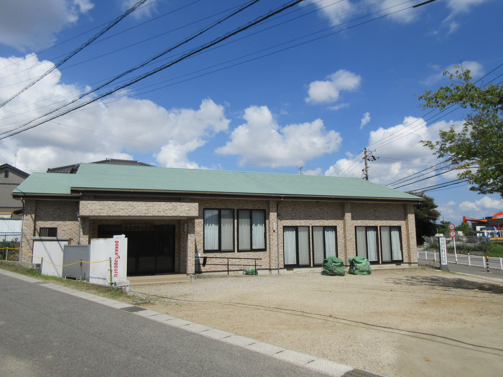 竜泉寺町公民館（岡崎市竜泉寺町）